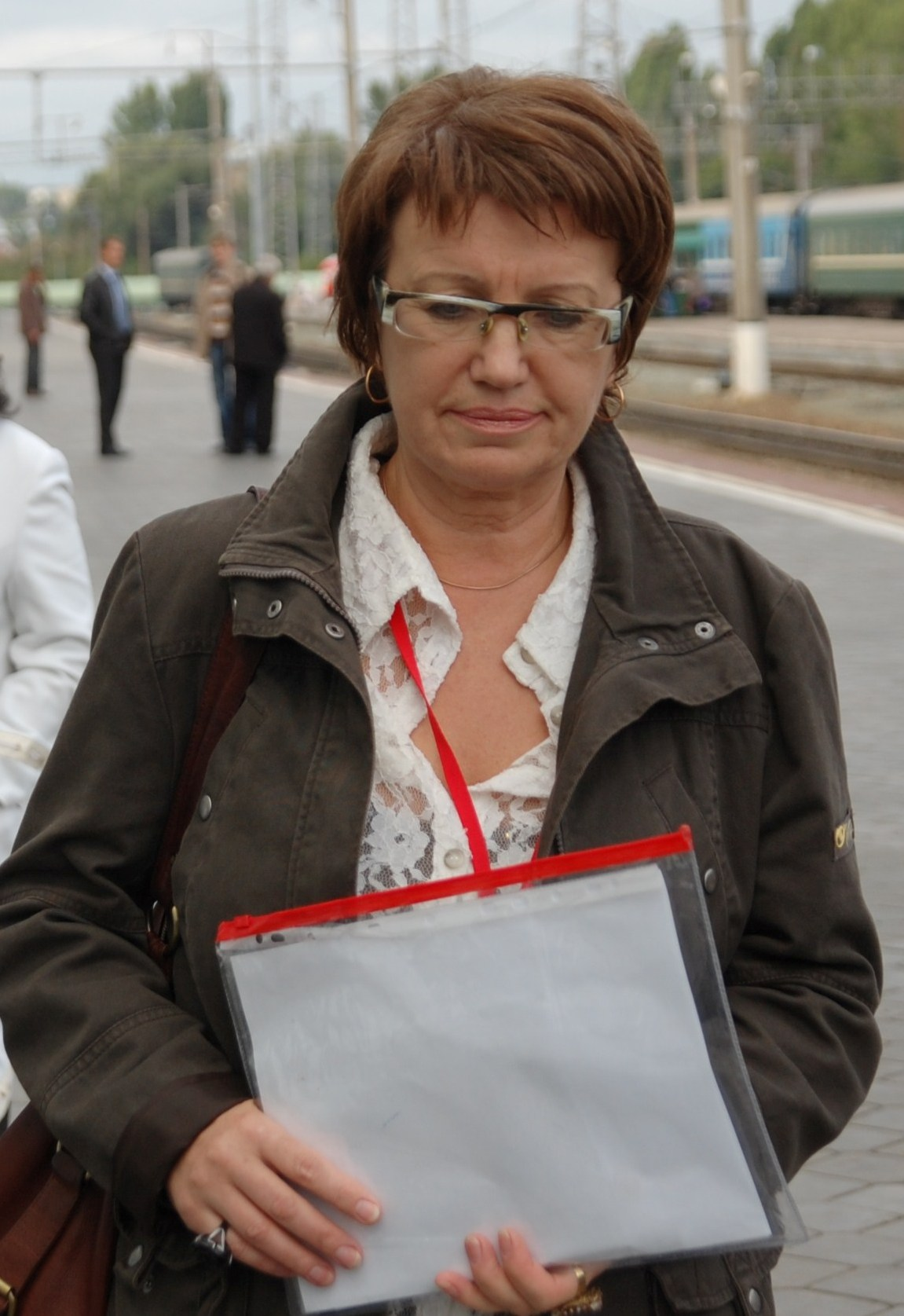 Директор фестиваля "Саратовские страдания" Татьяна Зорина. Саратов, 12 сентября 2011.